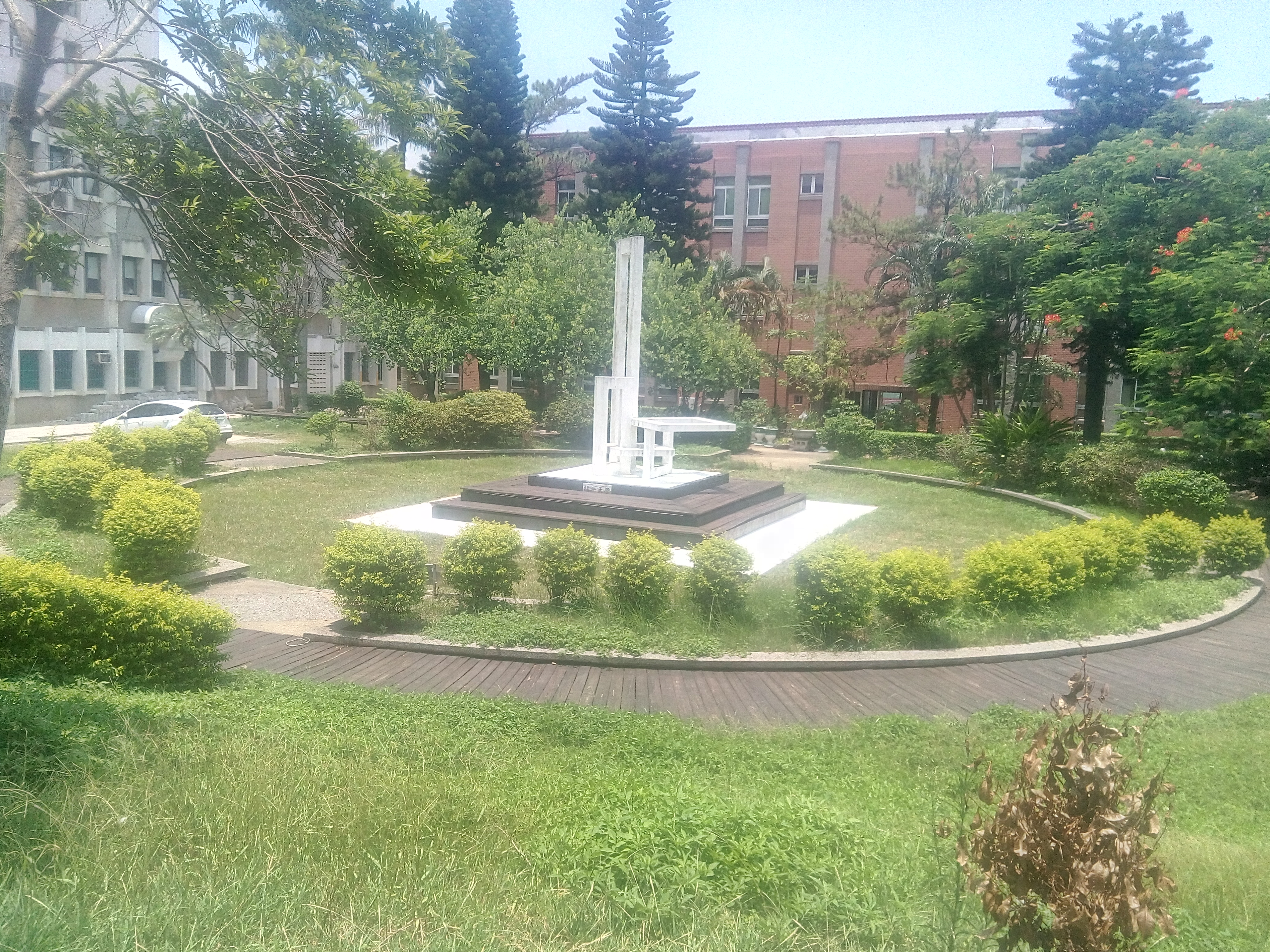 國立聯合大學中央庭院